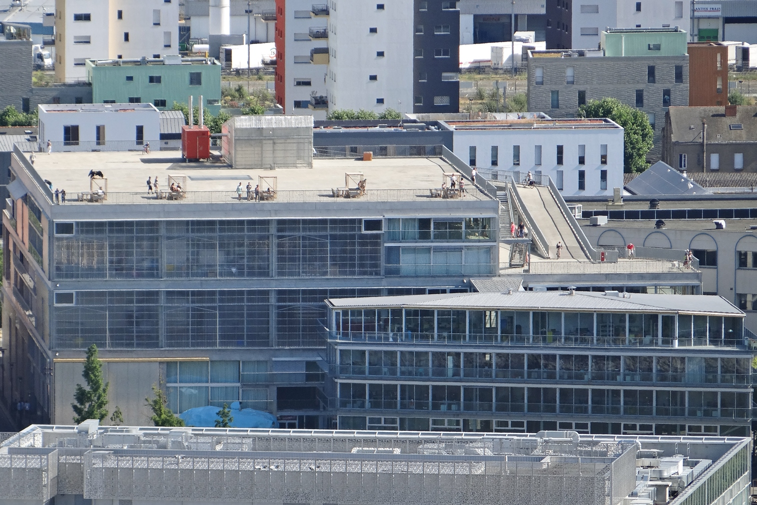 L'école d'architecture a été conçue par les architectes Anne Lacaton et Jean-Philippe Vassal le bâtiment, livré en 2009, est situé quai François Mitterrand. Le bâtiment principal est desservi par une rampe extérieure en pente douce. Elle permet au public d'accéder à la terrasse et durant le Voyage à Nantes, de voir des installations d'artistes. Le petit bâtiment est relié au bâtiment principal par une passerelle couverte. Au rez-de-chaussée, il dispose d'une salle d'exposition.